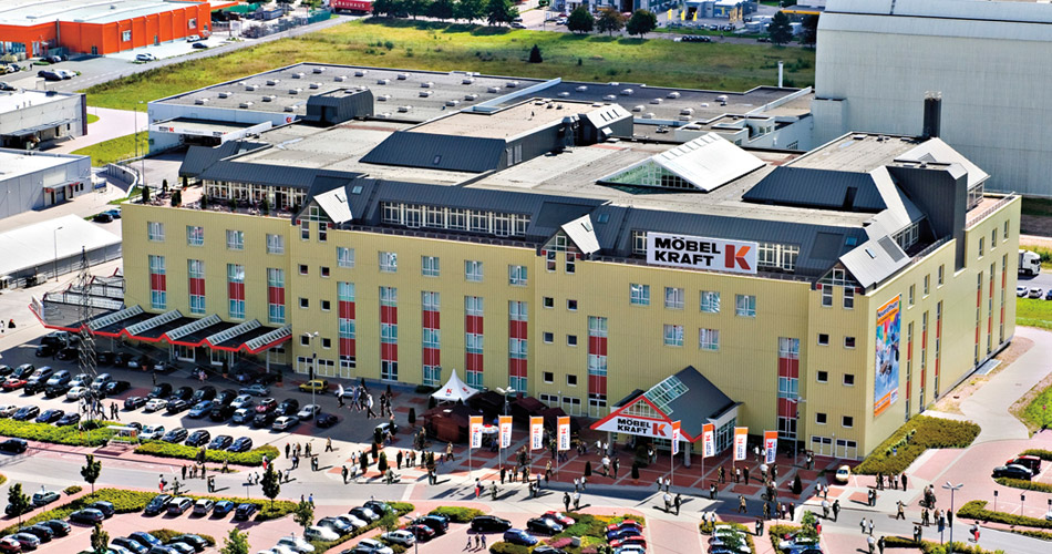 Möbel Kraft Einrichtungshaus in Buchholz i. d. Nordheide